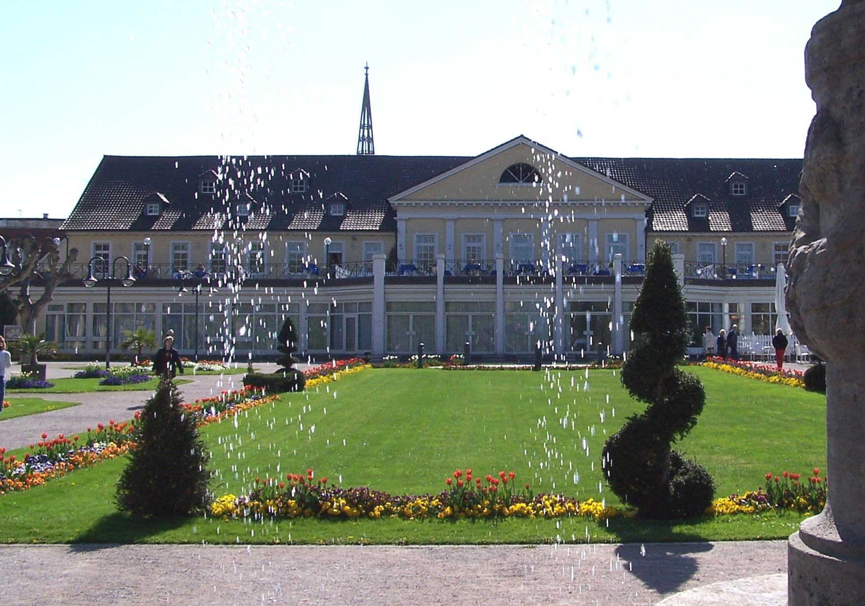 Bad Dürkheimer Kurhaus und Kurpark, erbaut 1822-26 anstelle des Leiningischen Schlosses